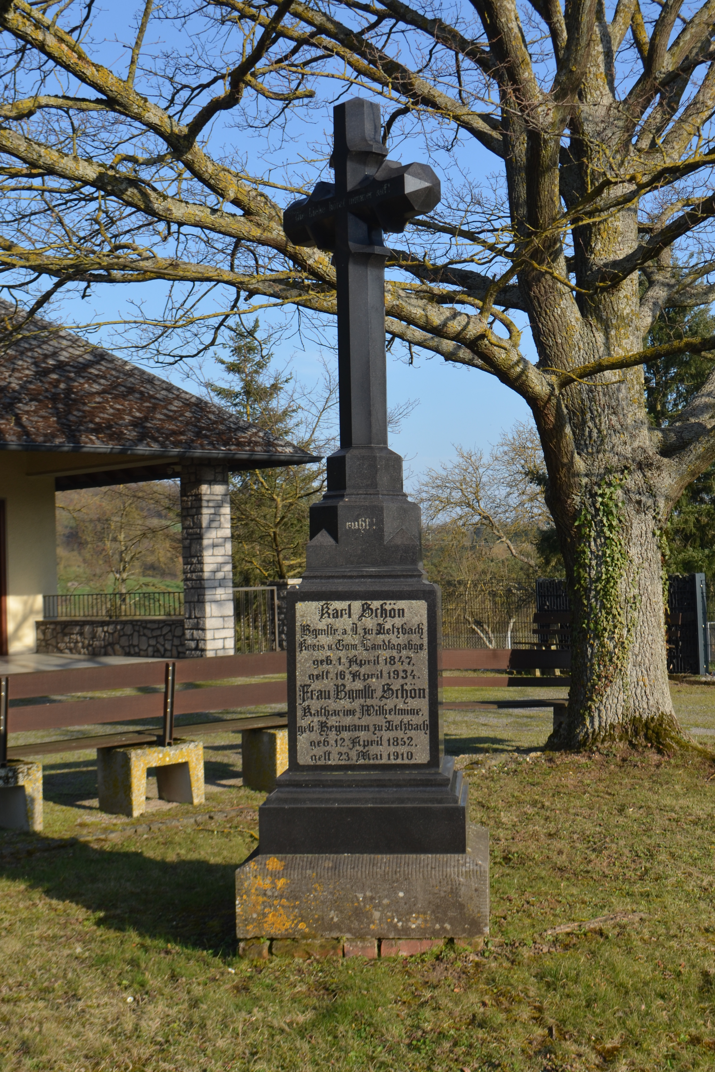 Oberneisen, Friedhof, Grabmal Karl Schön